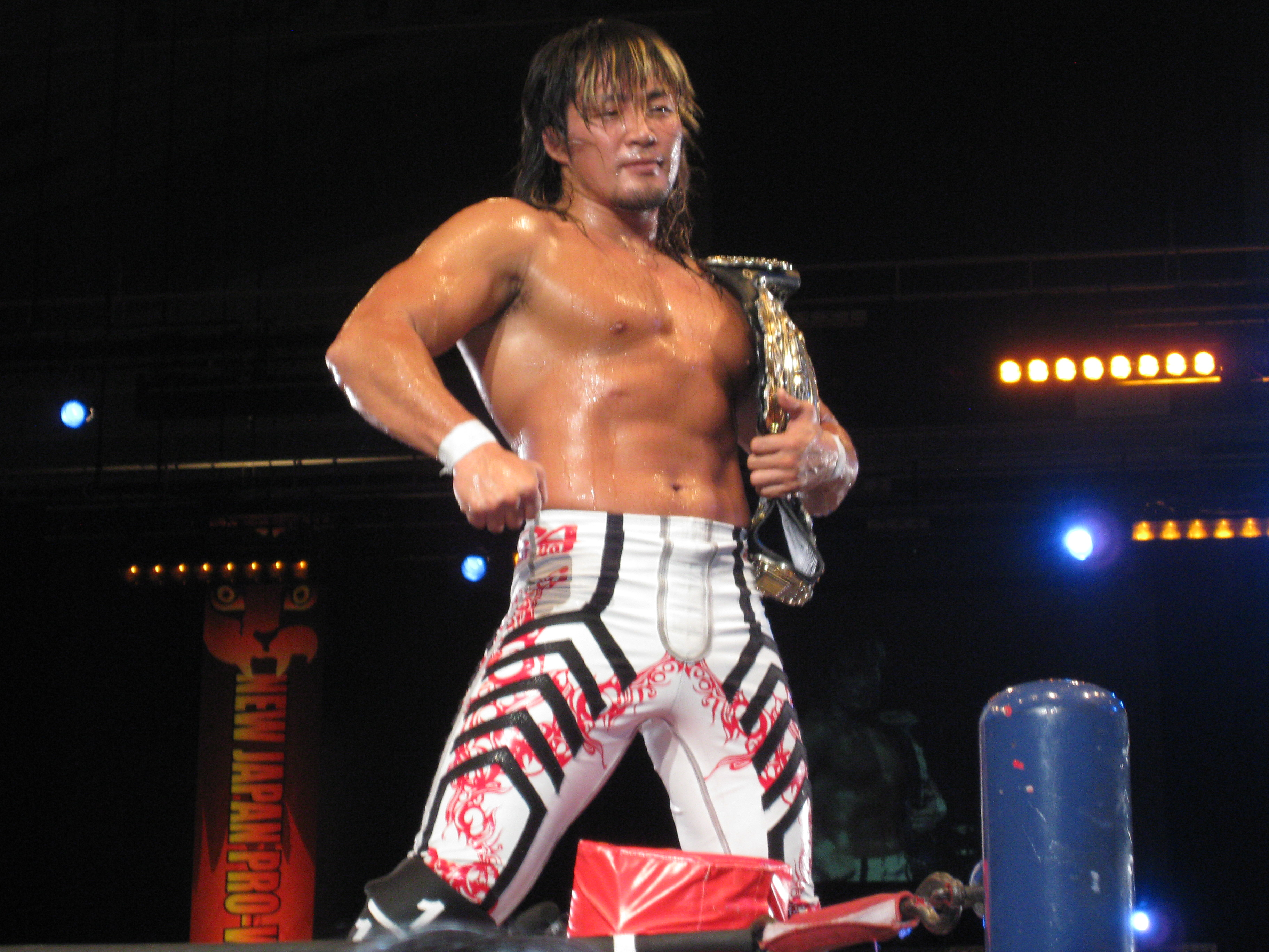 2011年8月7日 新日本プロレス 大阪大会